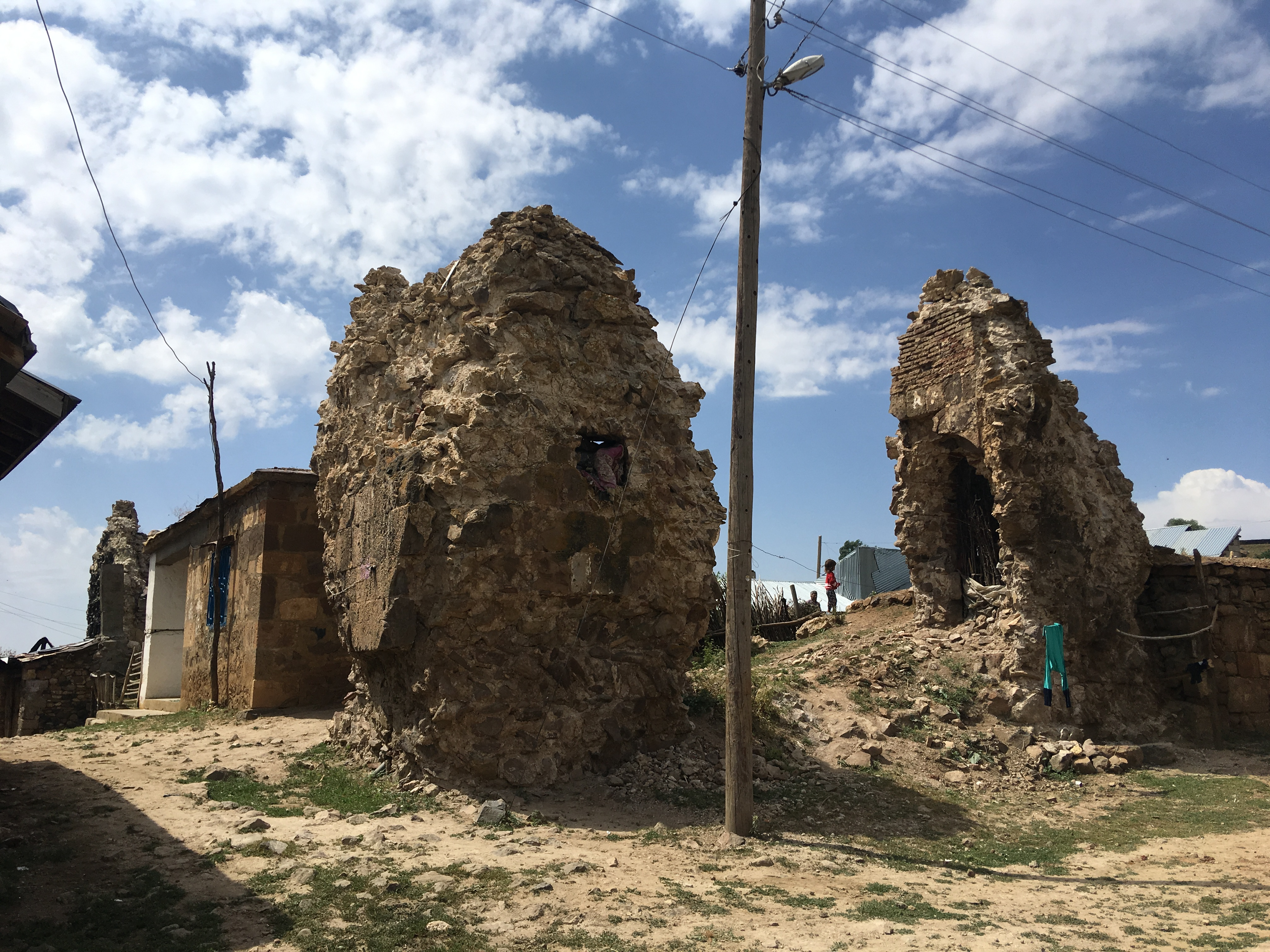 Մշո Սուրբ Կարապետի վանք